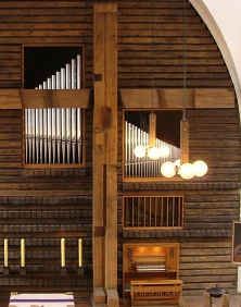 Orgel der kath. Kirche St. Antonius Großräschen